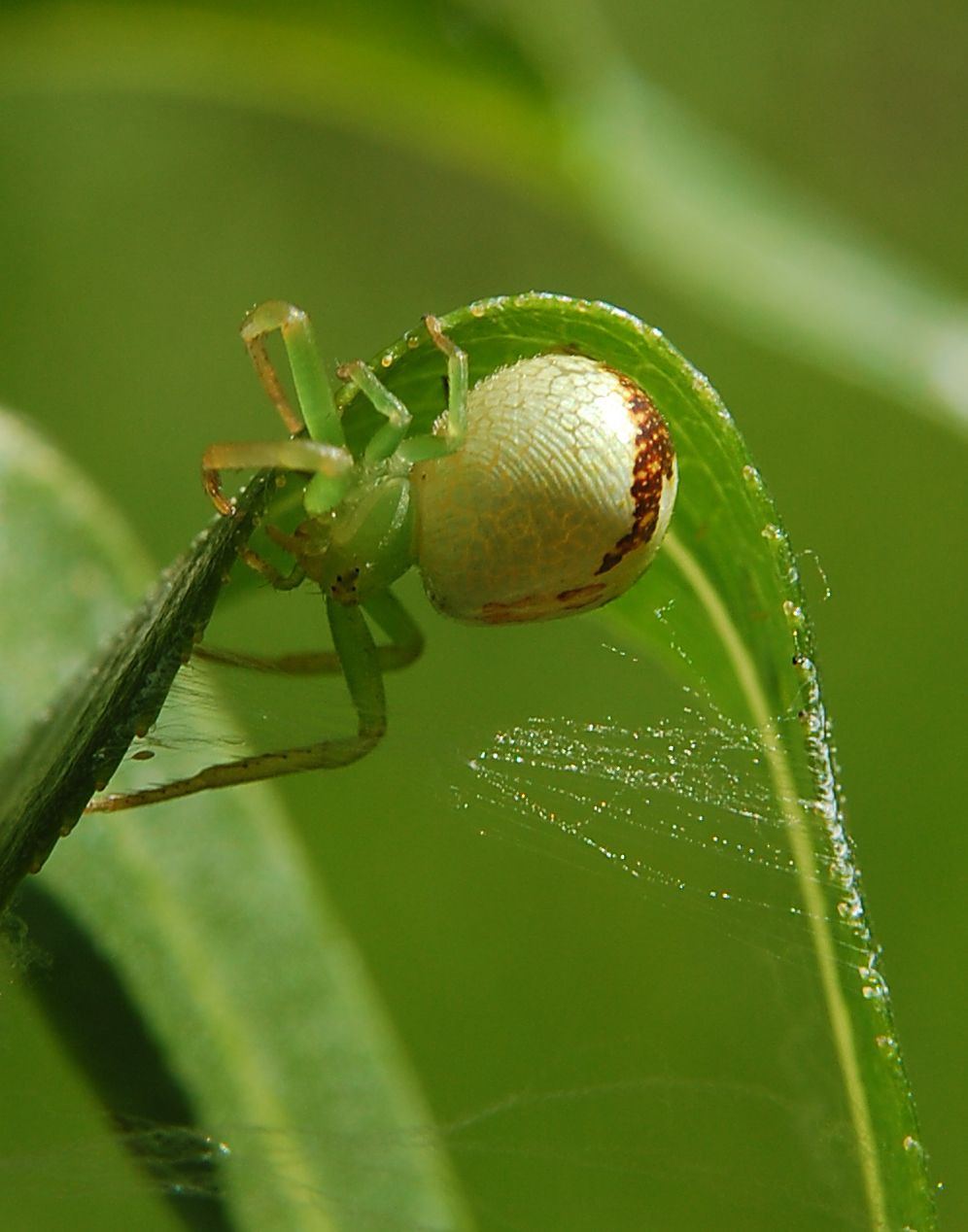 Ebrechtella tricuspidata, female (syn. Misumenops tricuspidatus)